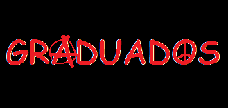 Logo de la telecomedia argentina Graduados